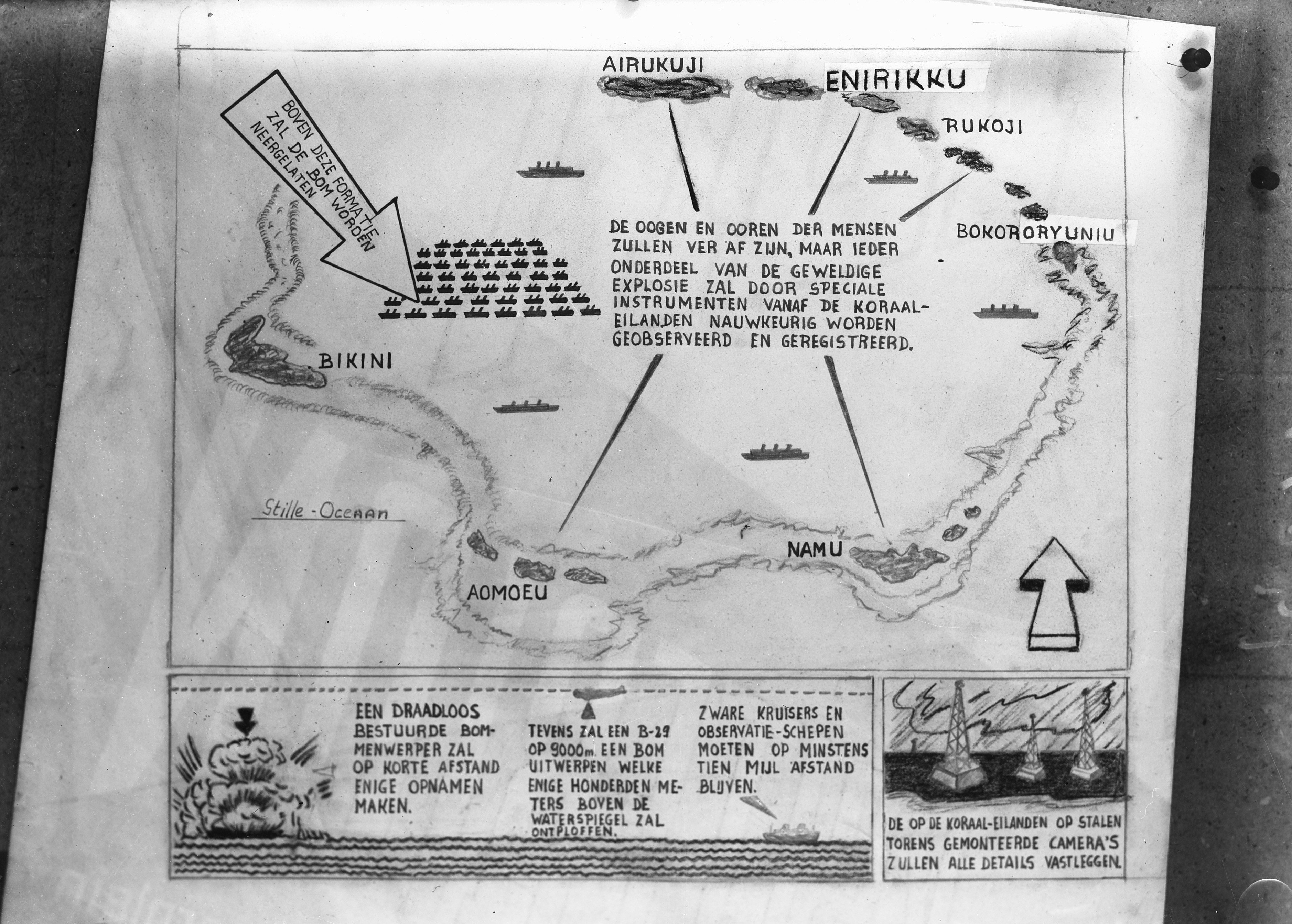 Collectie / Archief : Fotocollectie Anefo Reportage / Serie : [ onbekend ] Beschrijving : Overzicht voorgenomen test atoombommen Bikini-eilanden (Operations Crossroads, resp. Abel en Baker). KLM luchtfoto Datum : 14 februari 1946 Trefwoorden : KLM, Luchtfoto Instellingsnaam : KLM Fotograaf : Vrind, Luuk / Anefo Auteursrechthebbende : Nationaal Archief Materiaalsoort : Glasnegatief Nummer archiefinventaris : bekijk toegang 2.24.01.09 Bestanddeelnummer : 901-4654